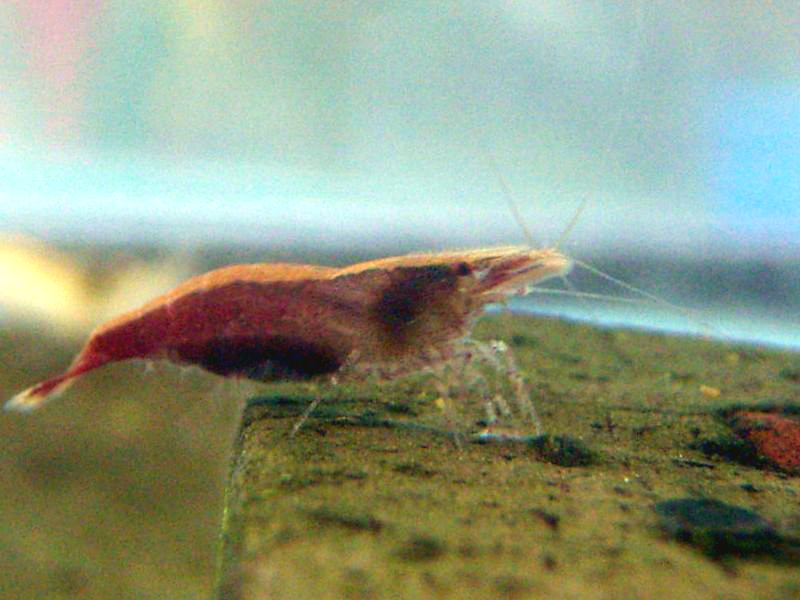 Caridina serratirostris(ヒメヌマエビ)。背中に縦線がある個体。抱卵している。